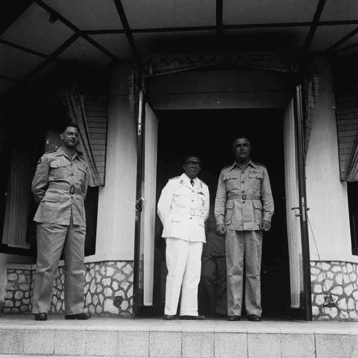 negatief. President Sukawati van Oost-Indonesië met kolonel Scheffelaar in Makassar